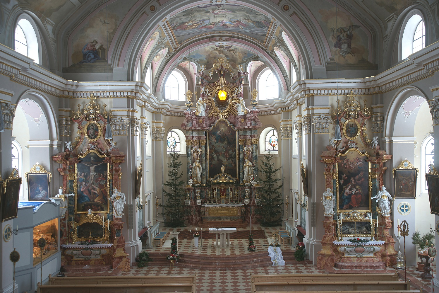 Kath. Pfarrkirche hl. Nikolaus Innenansicht